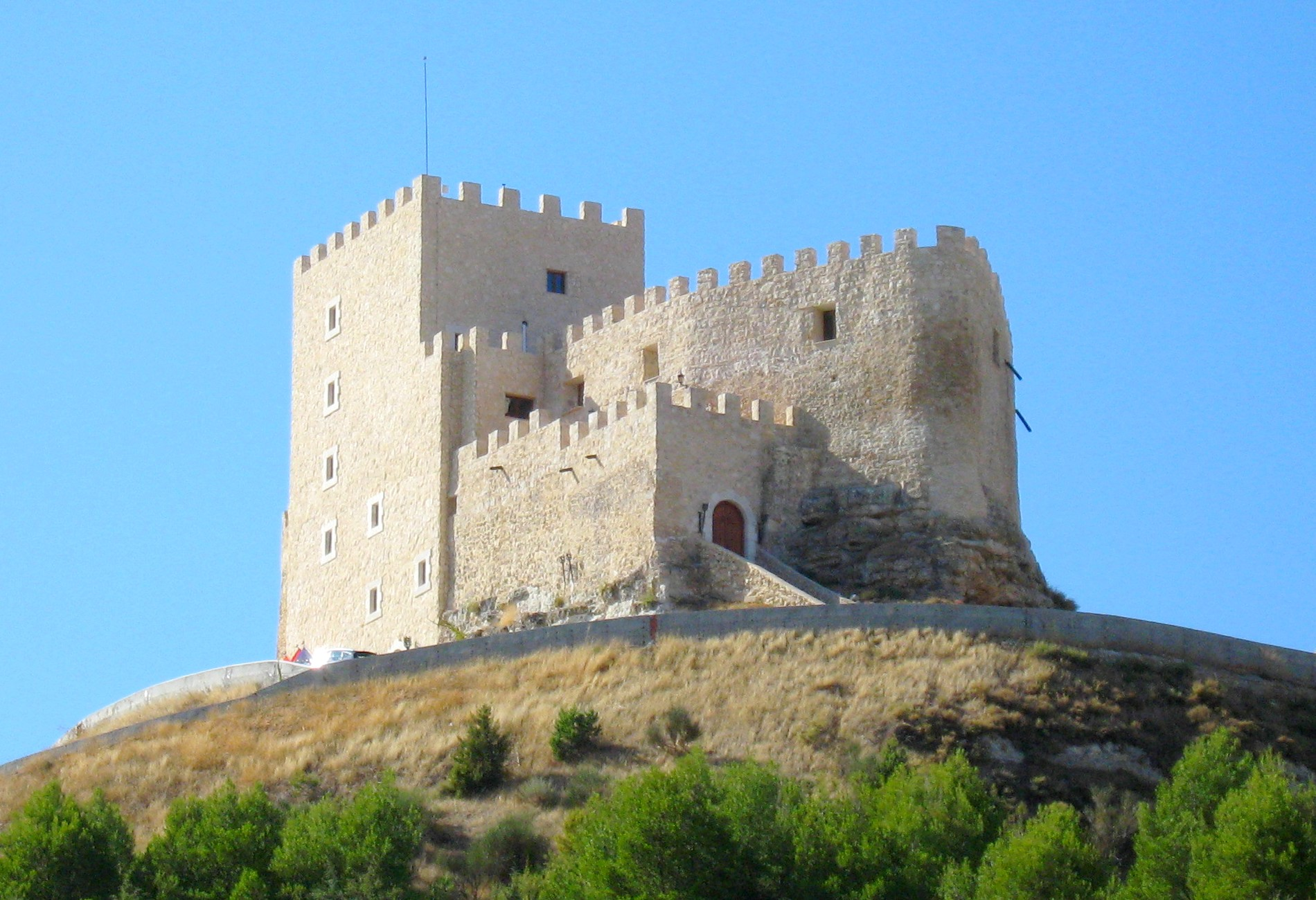 Curiel de Duero. Castillo. Valle del Cuco. Ribera del Duero. Valladolid